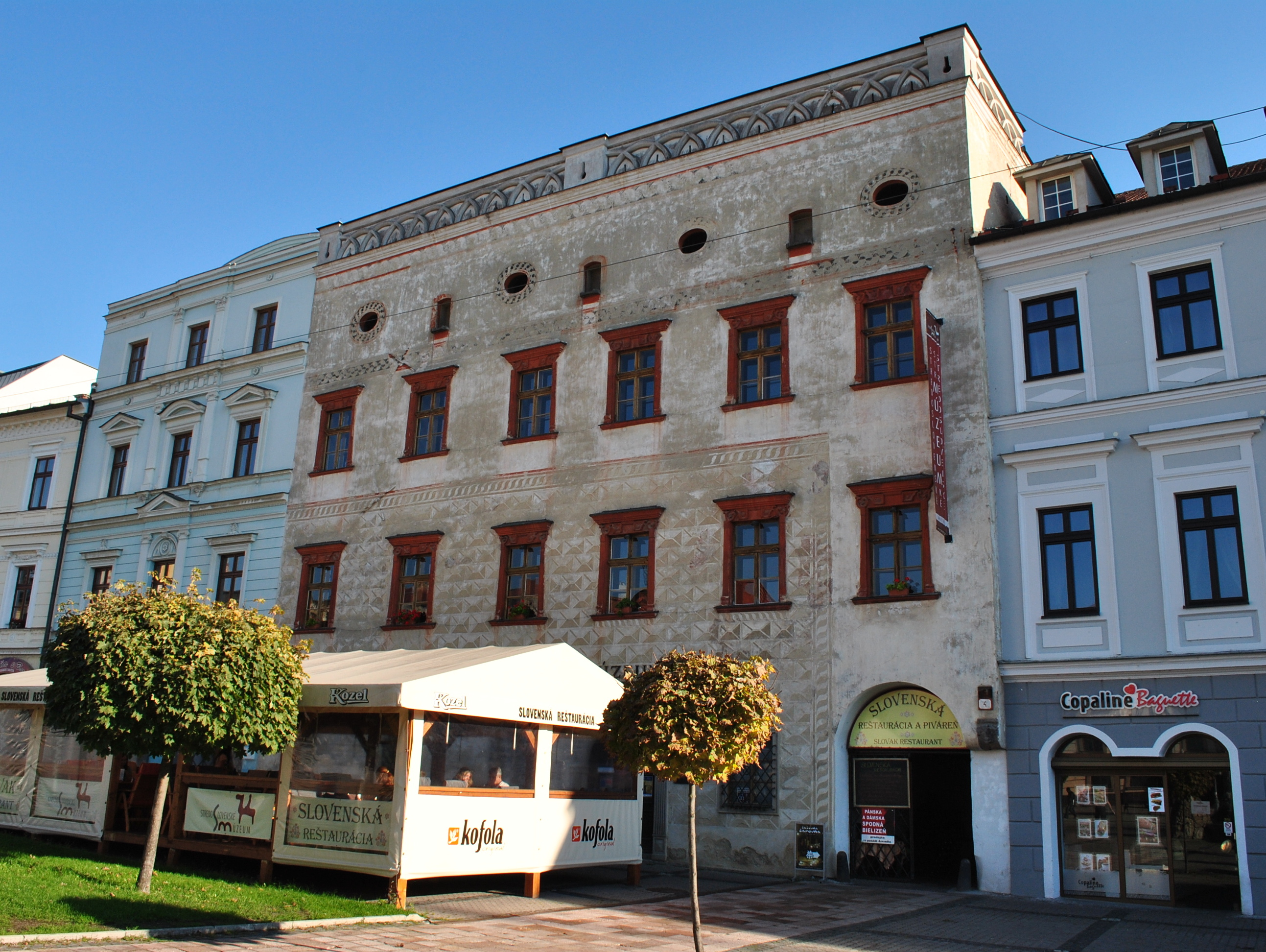 Banská Bystrica - Dom meštiansky, tzv. Thurzov dom